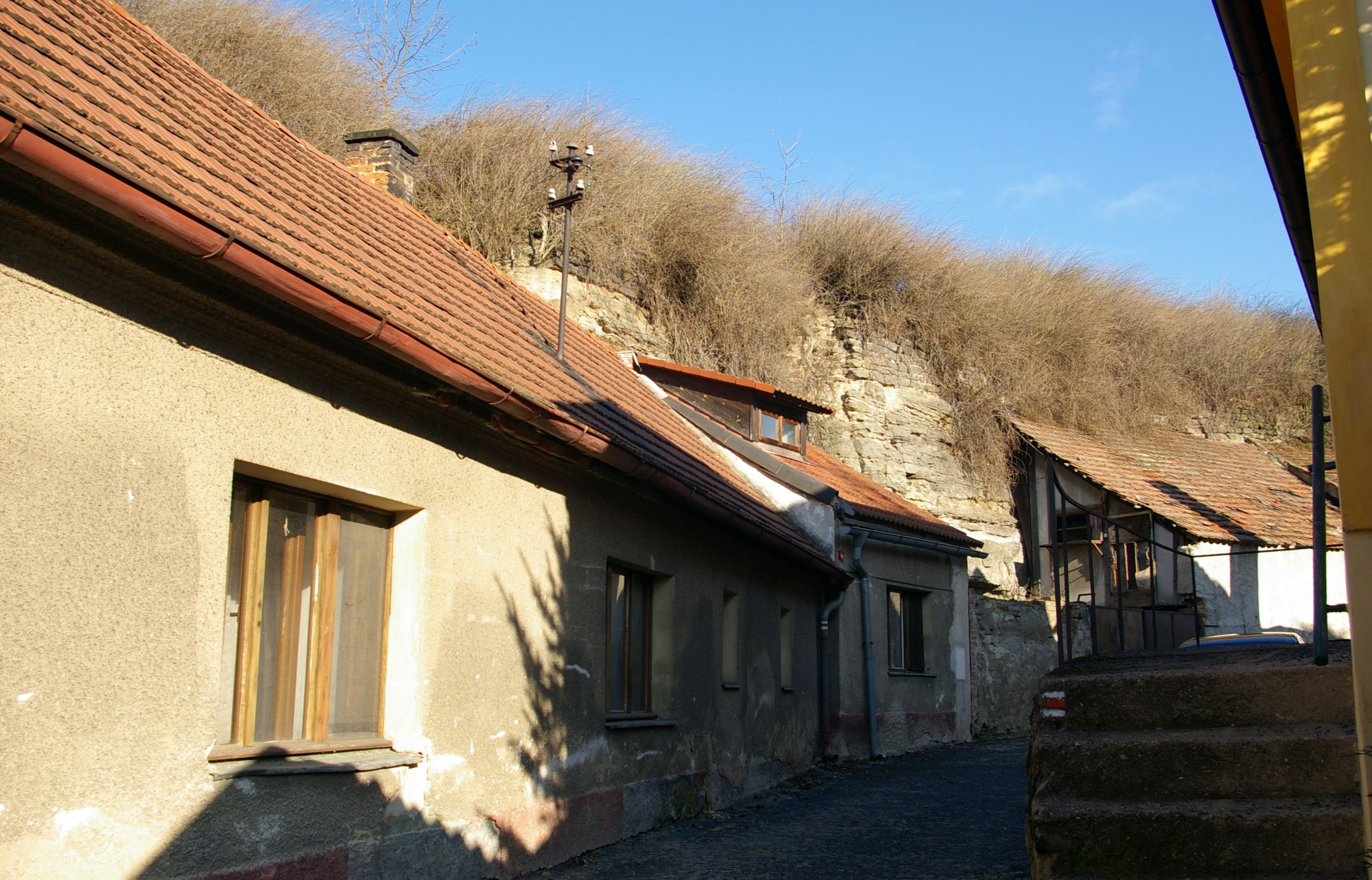 Jenštejn, domky v bývalém hradním příkopu.